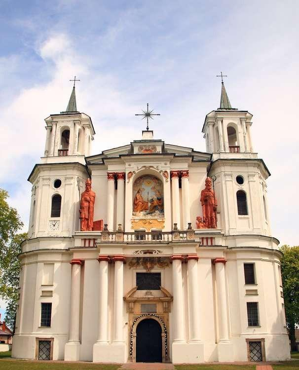 Church in Tarłów, Poland